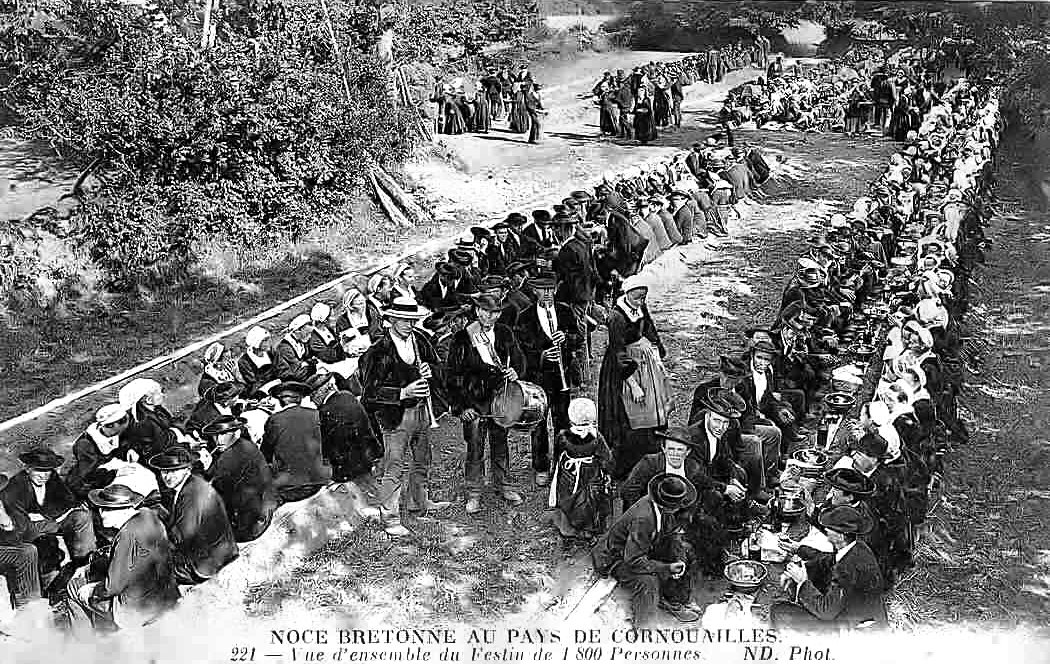 La célèbre noce de Kerber en Berrien en mai 1906. Environ 2000 personnes y sont conviées. Vue d'ensemble prise sur le toit d'une chaumière.